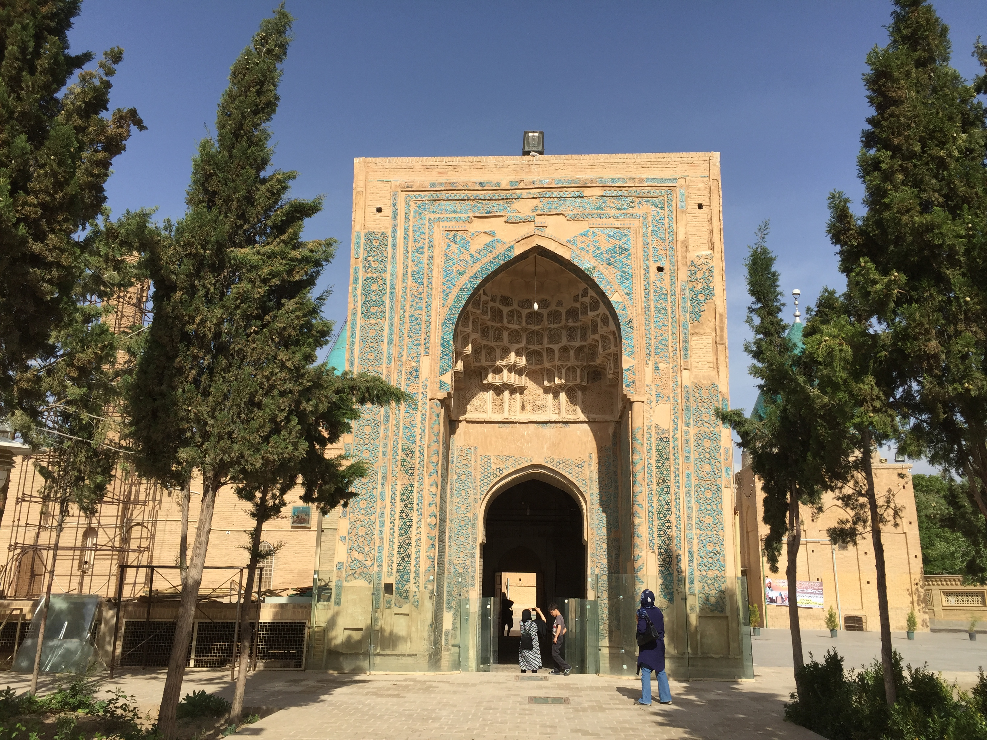 مسجد شیخ بسطامی